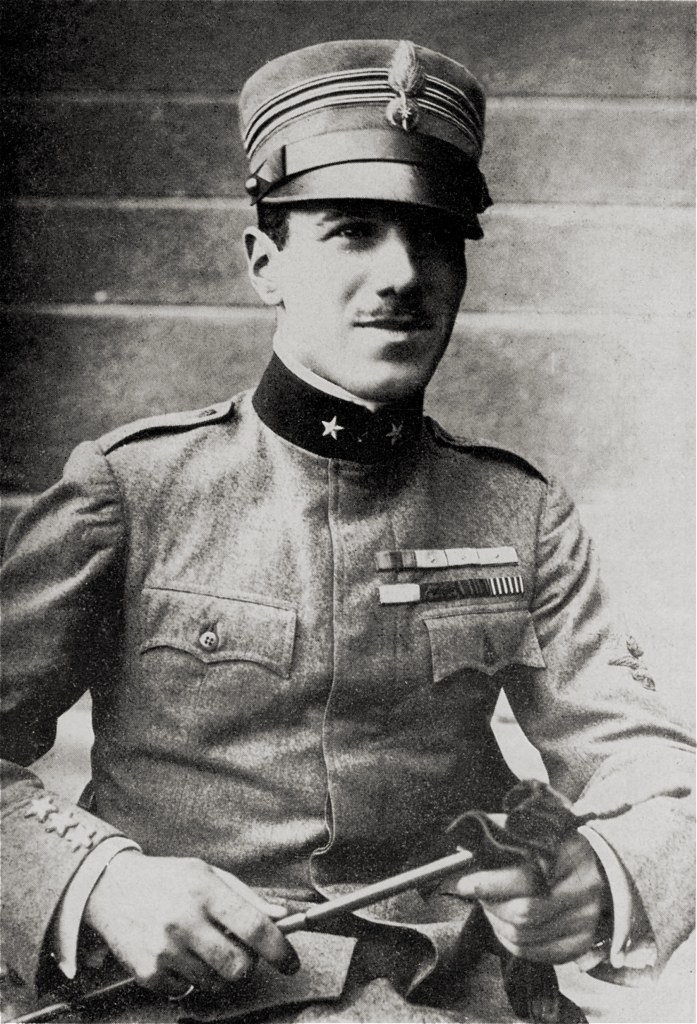 Francesco Baracca ászpilóta